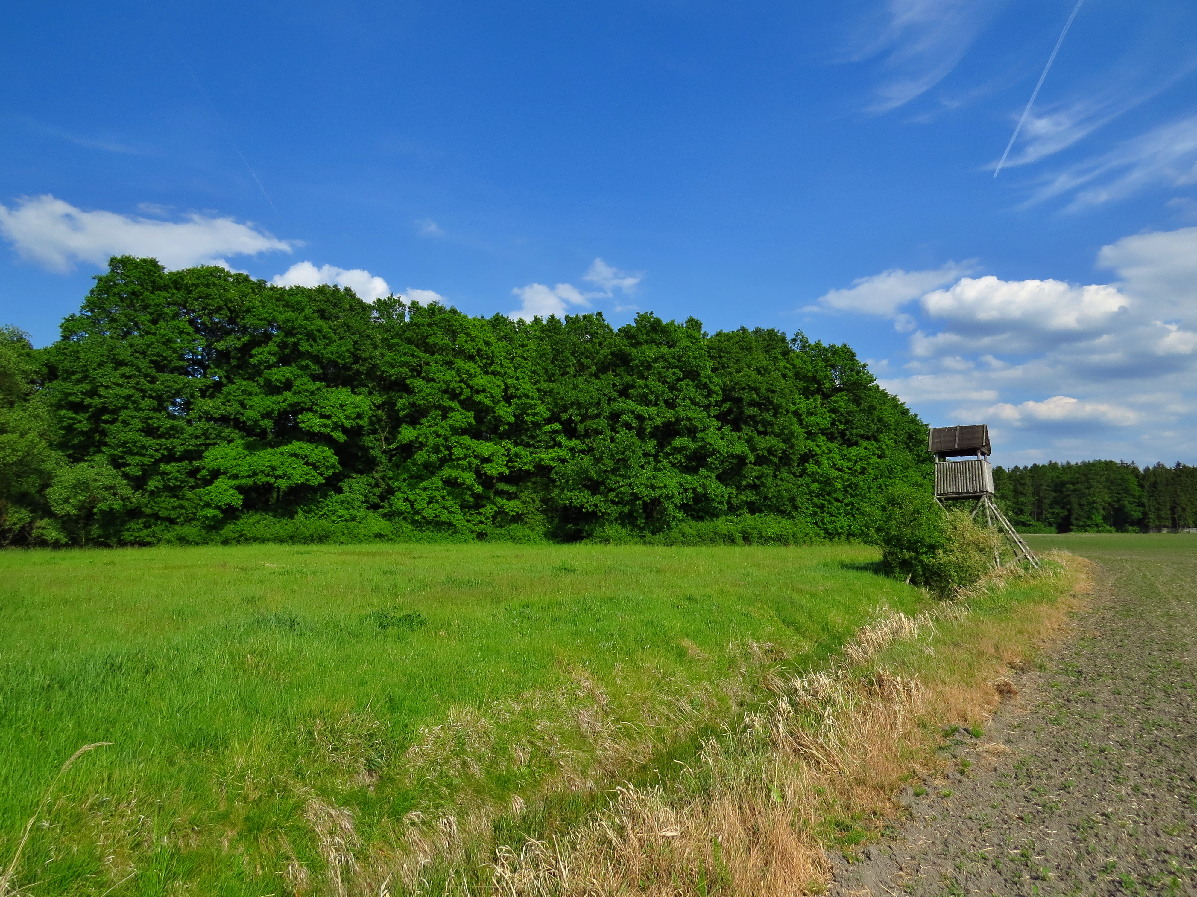 Teplomilná doubrava a bezkolencová louka asociace Melicopictae-Quercetum roboris Project: Chráněná území